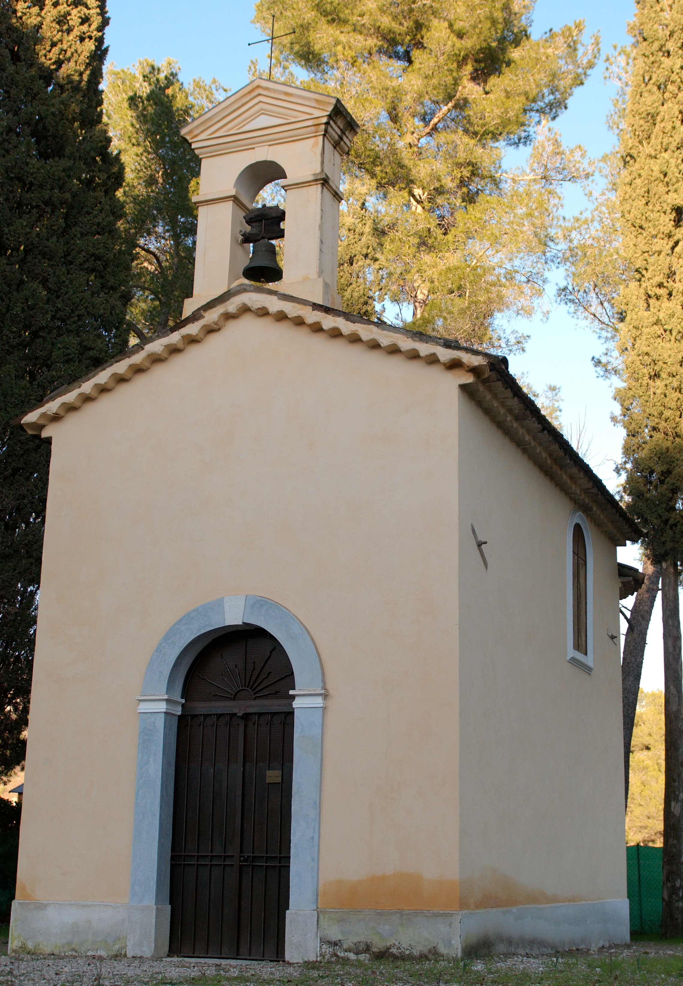 Chapelle Saint Lambert, à Vence